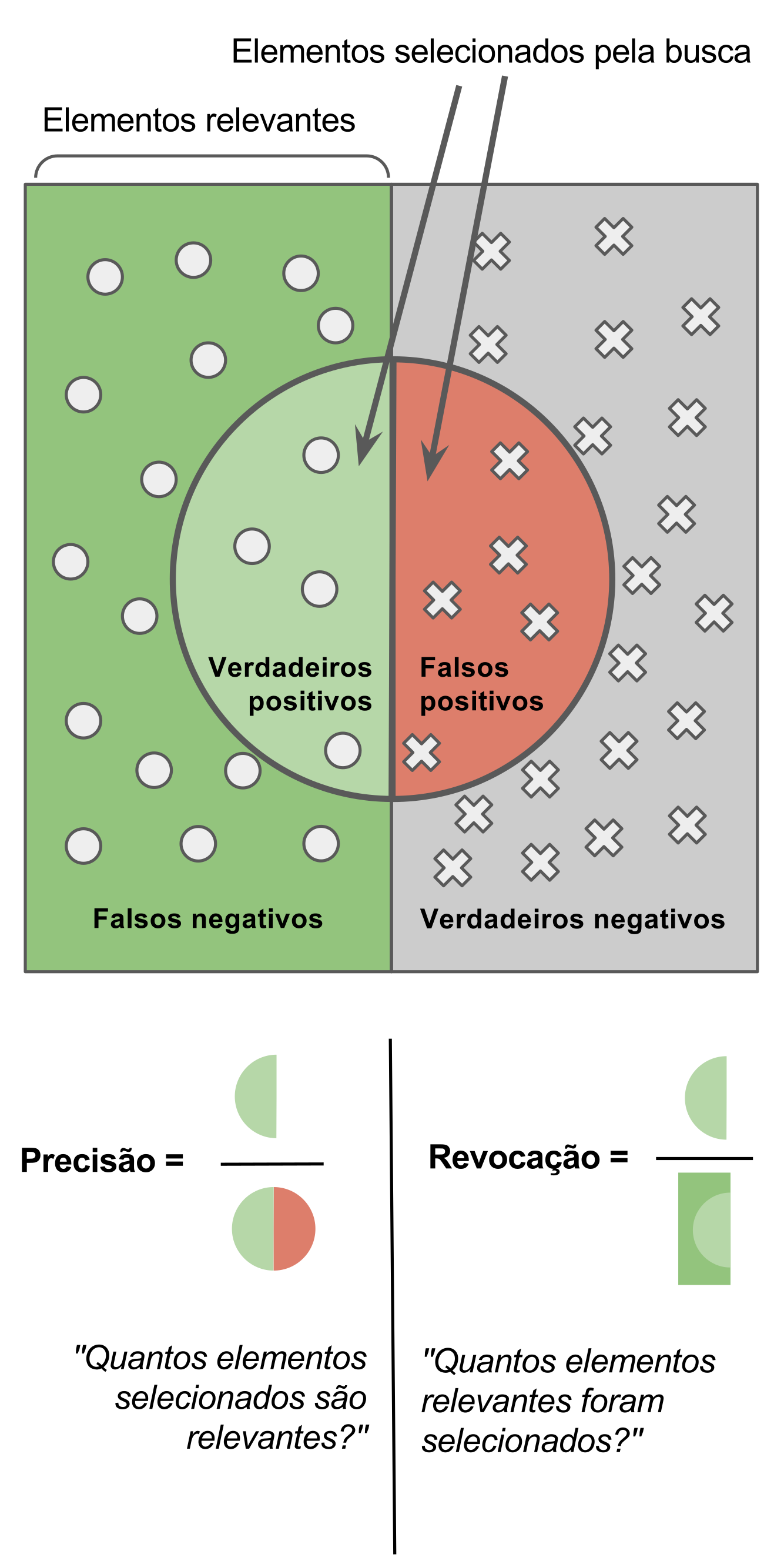 Adaptado de